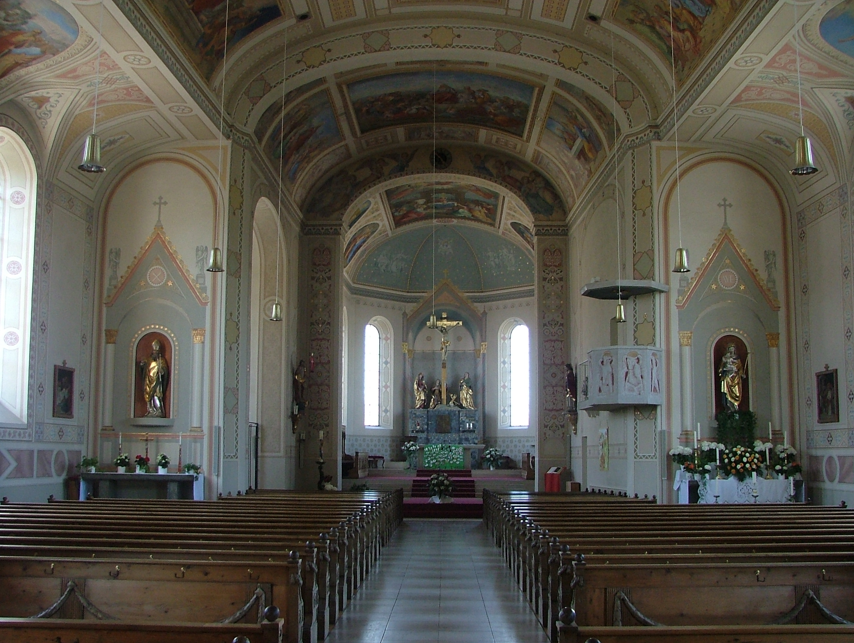 Pfarrkirche Dietmannsried